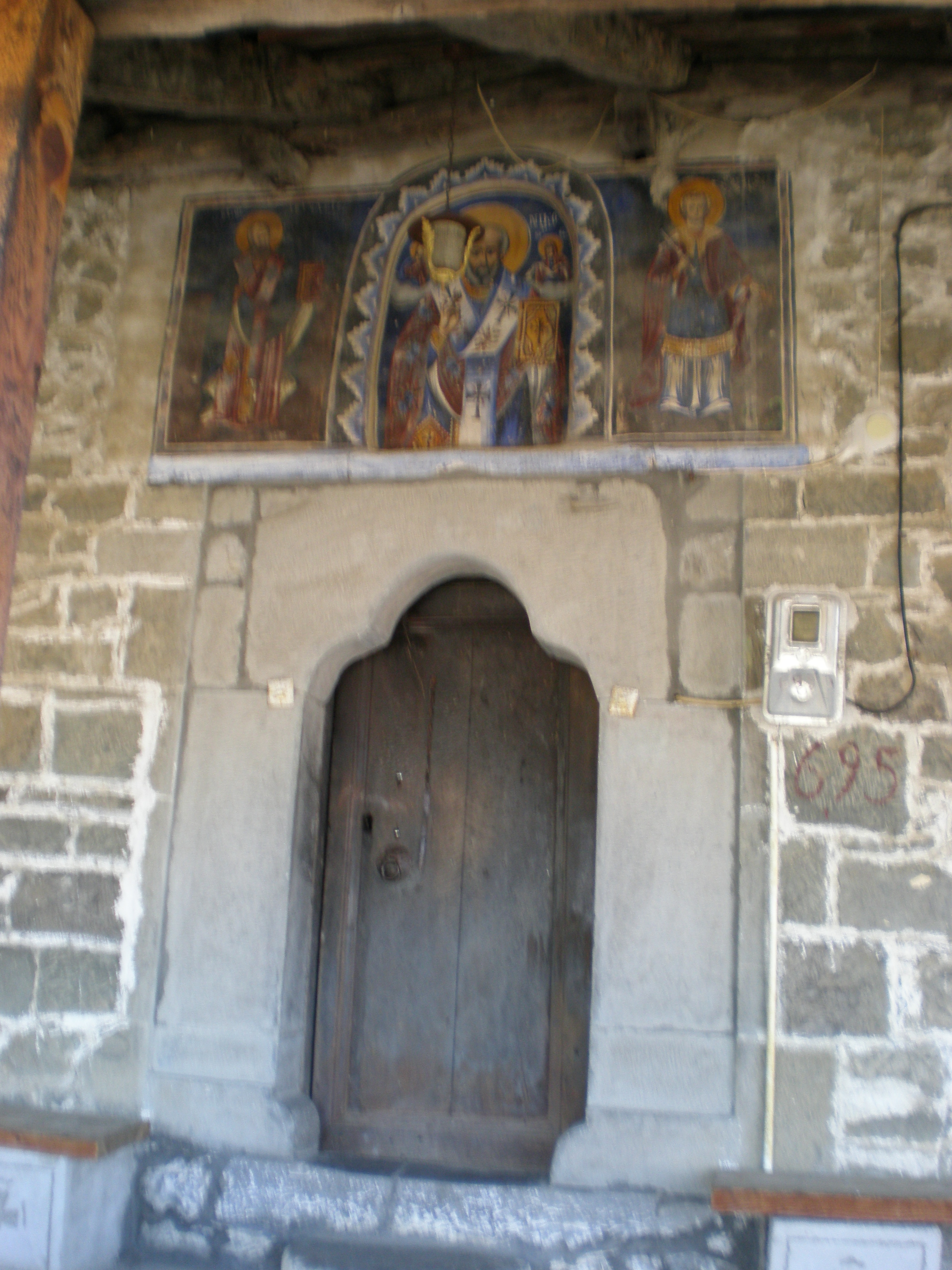 Entrance of the church of St Nicolaos in Molista